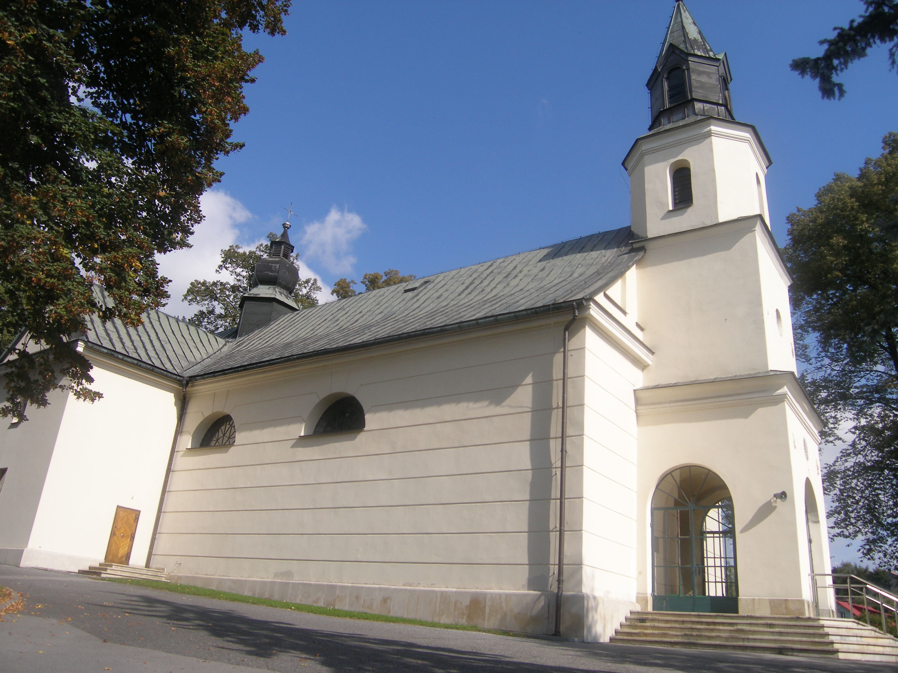 kościół parafialny p.w. św.Kazimierza Rybna, Czernichów